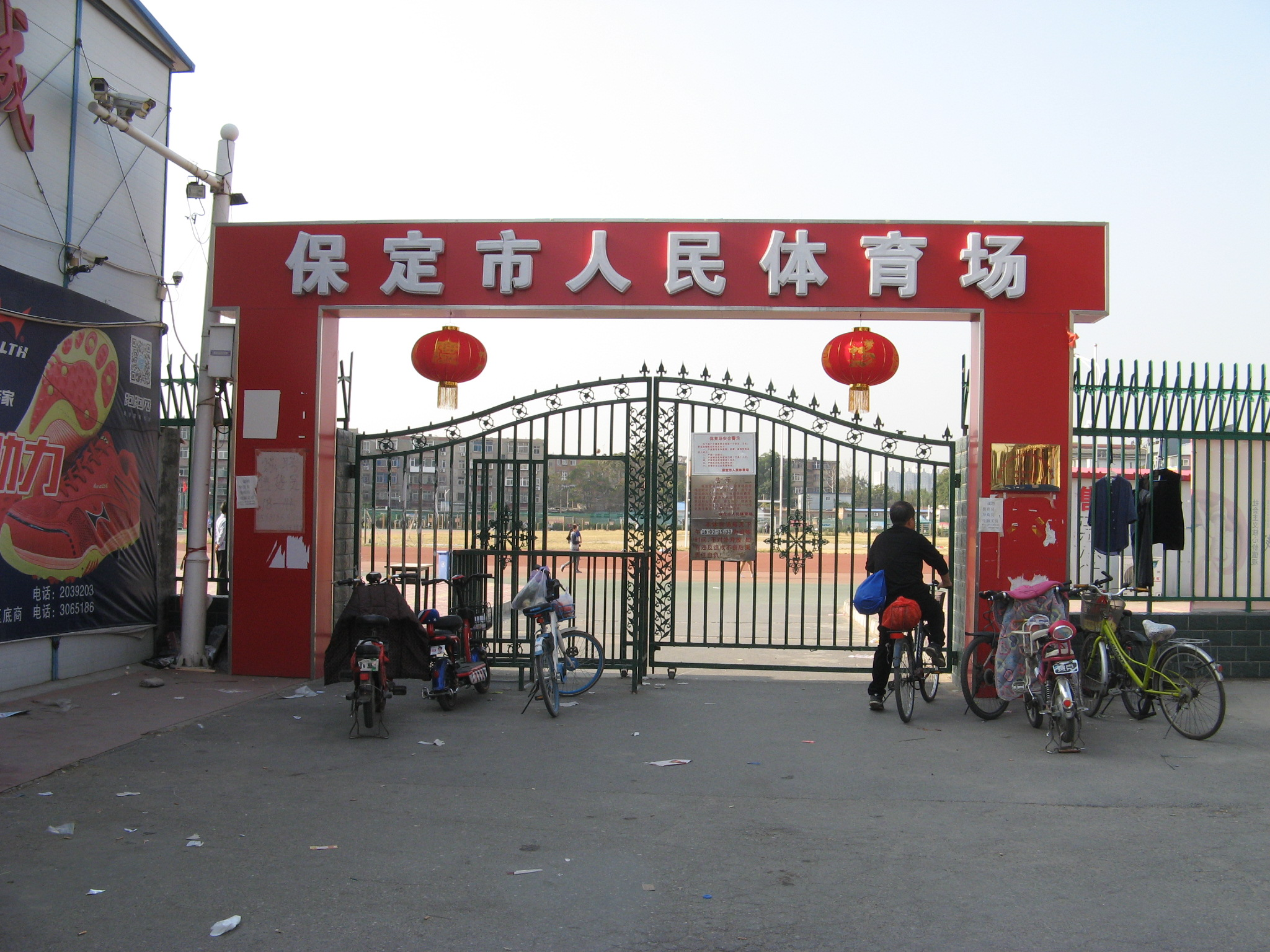 中华人民共和国河北省保定市，保定市人民体育场